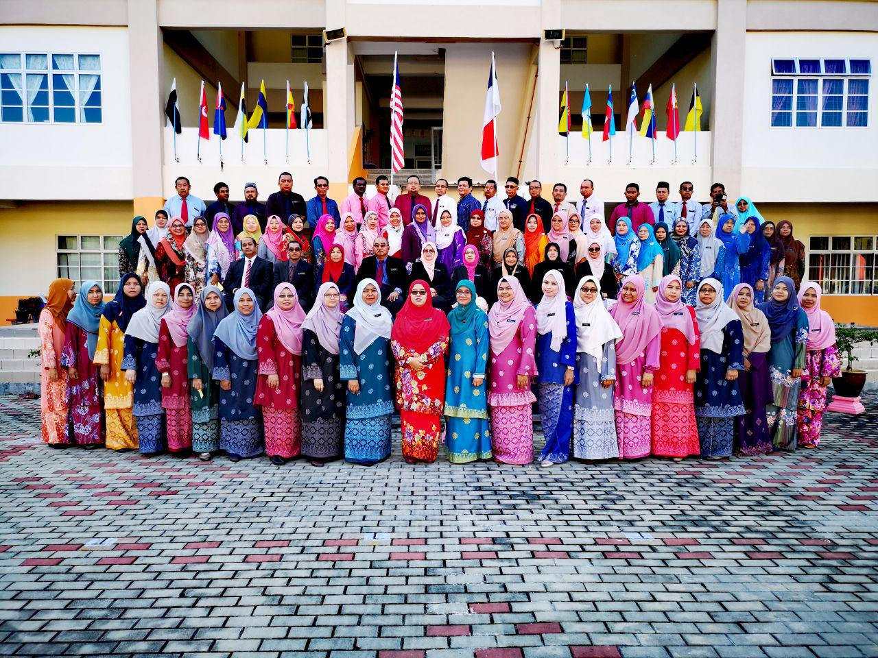 GURU SMKTSZ 2019